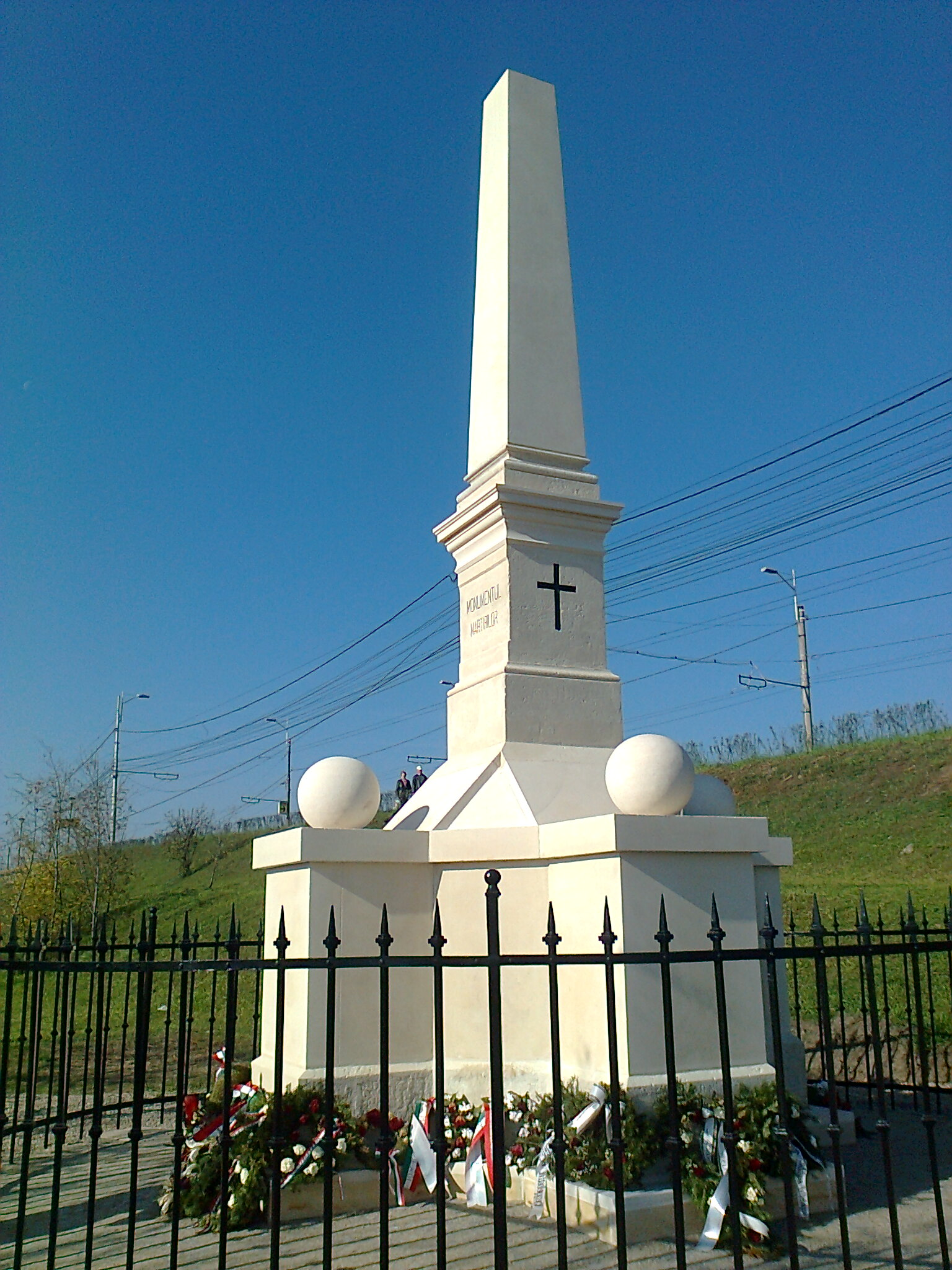 Felújított honvédemlékmű Kolozsvár és Szamosfalva között (2013. október 18-án avatták fel újra)